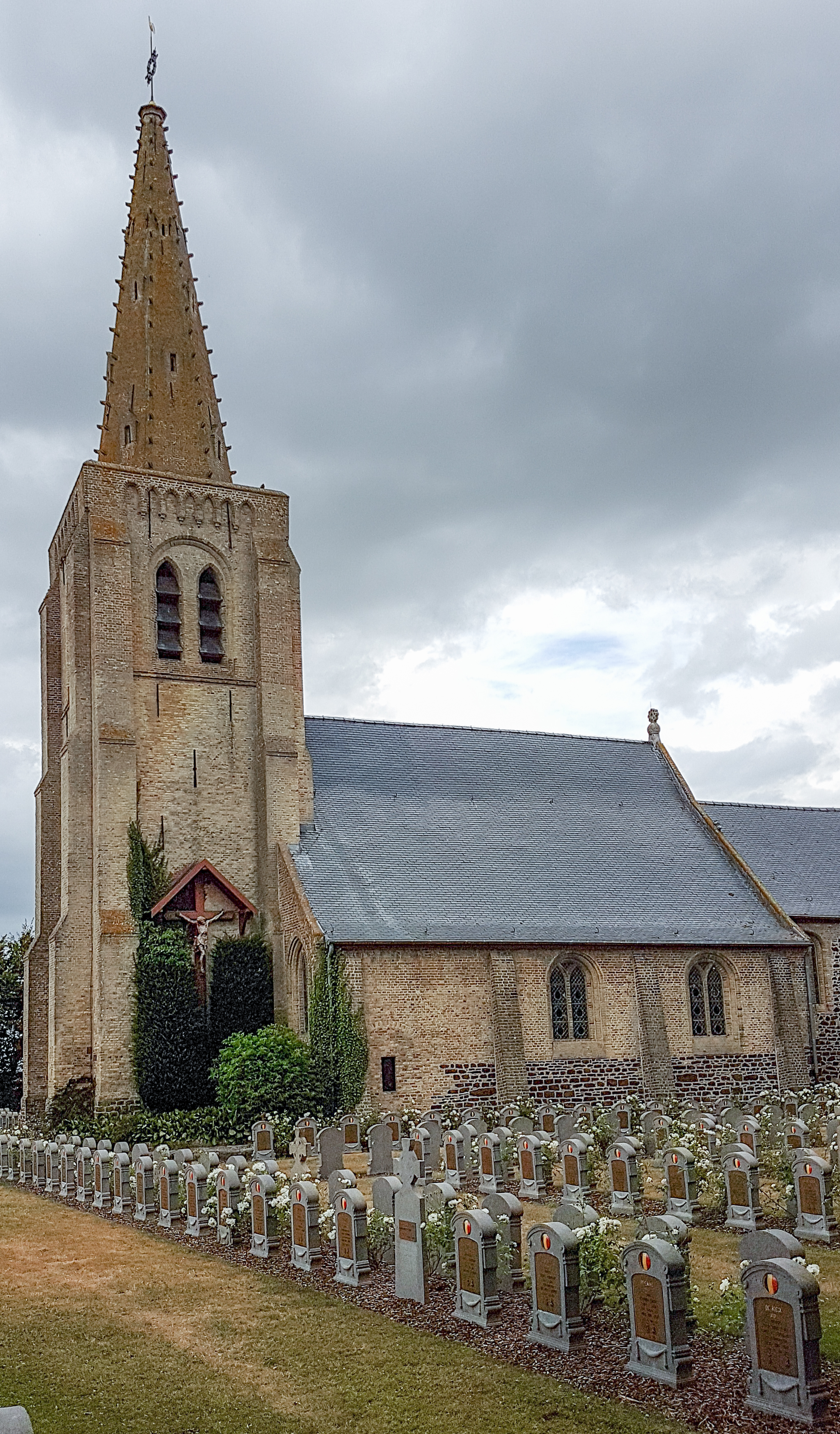 Belgian Military Cemetery Oeren